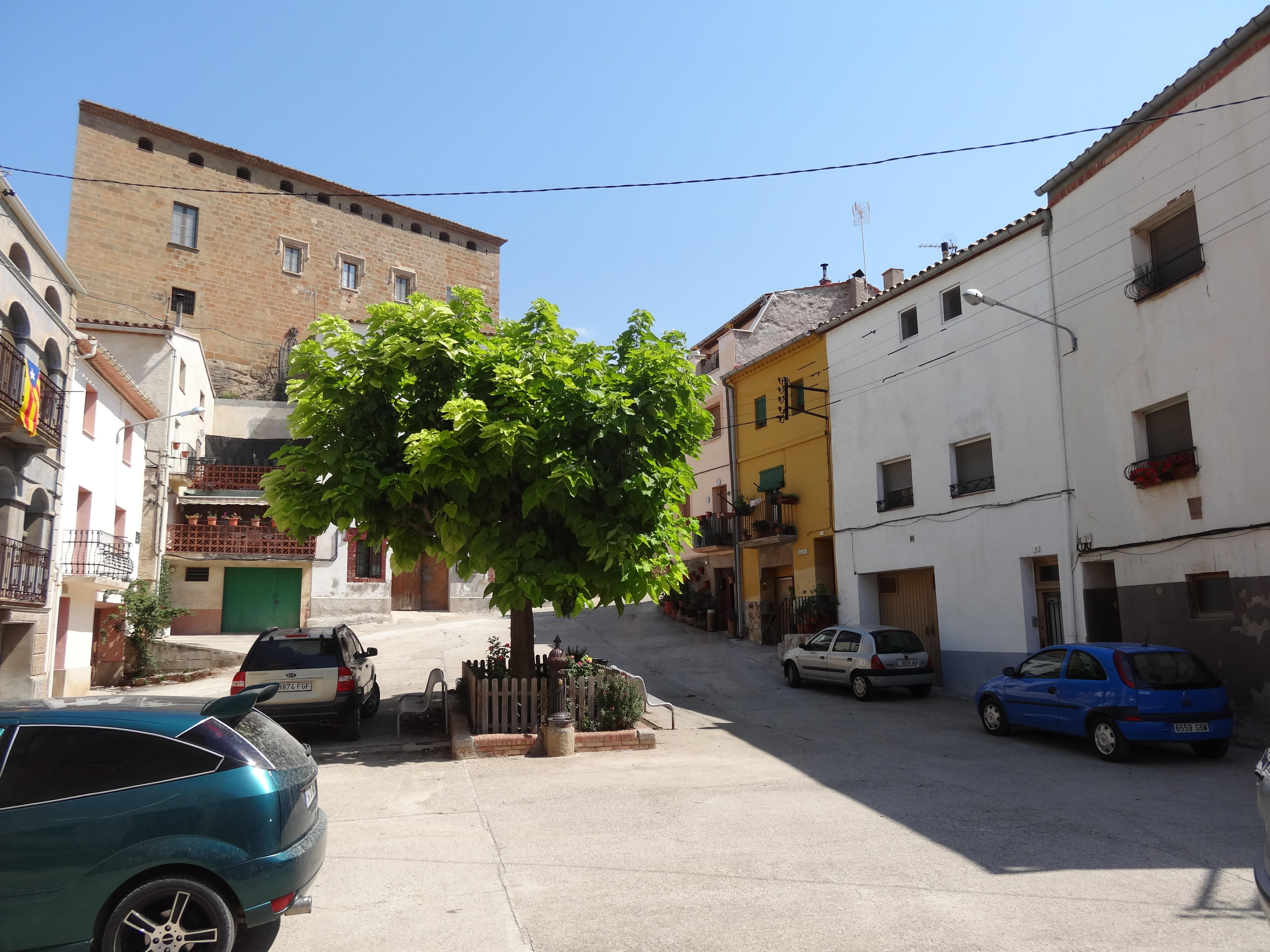 Vista del centre de Preixens, amb el castell al fons a l'esquerra